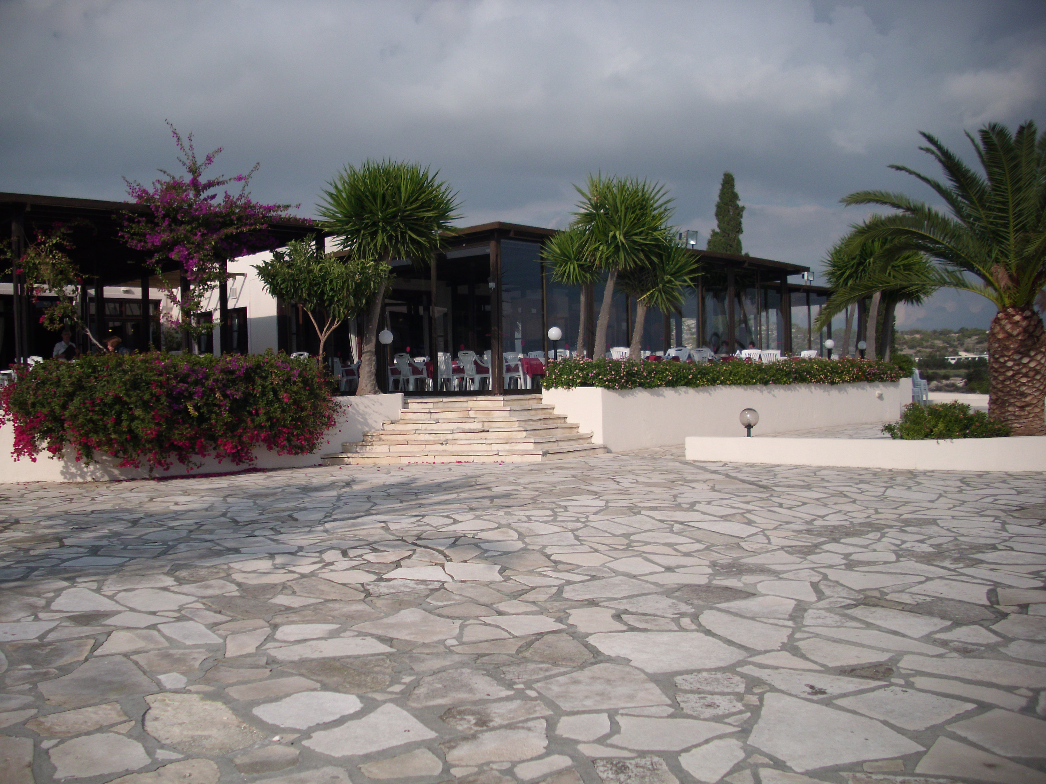 Terrasse Kalymnos